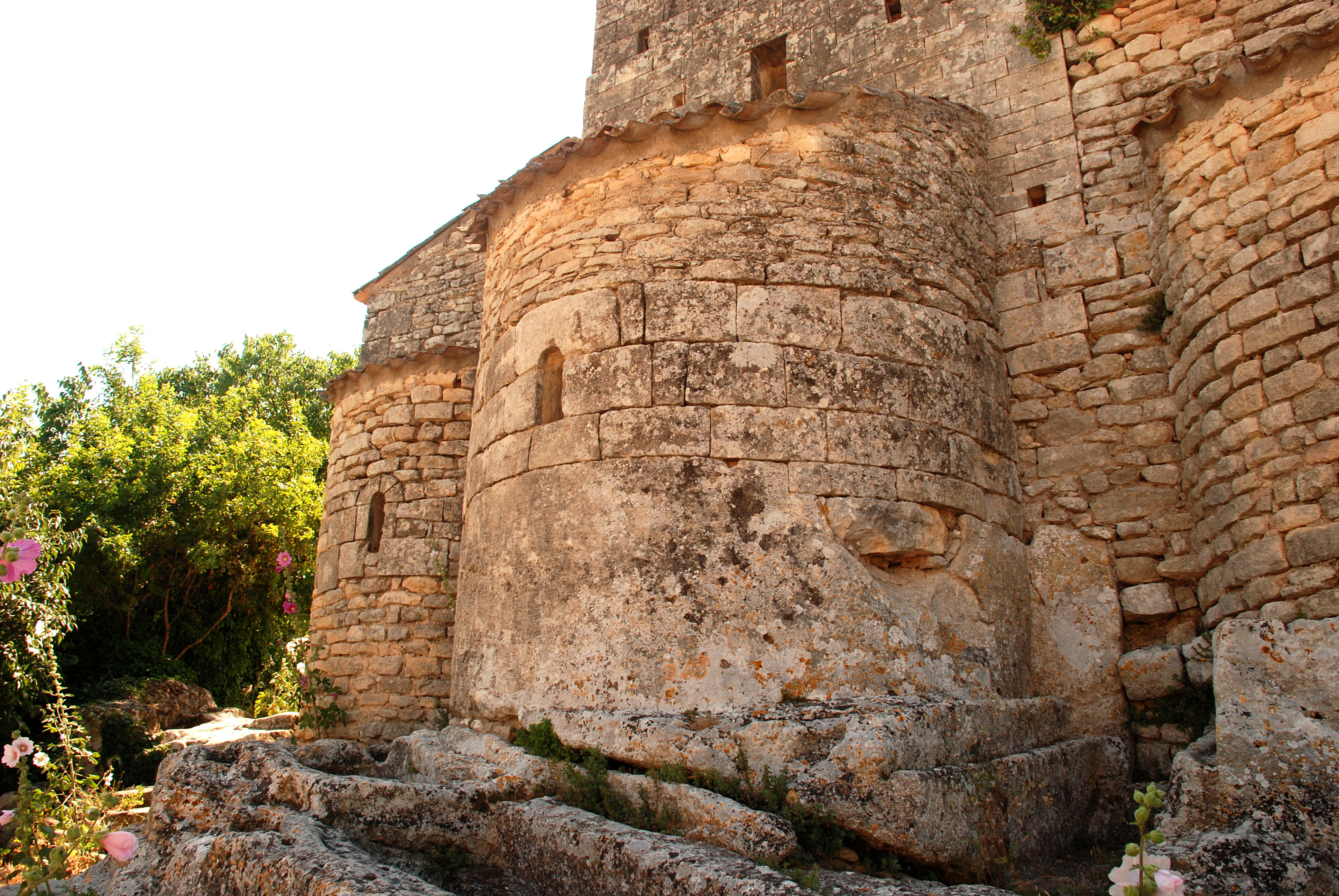 France - Provence - Vaucluse - Luberon - Église de Saint-Pantaléon